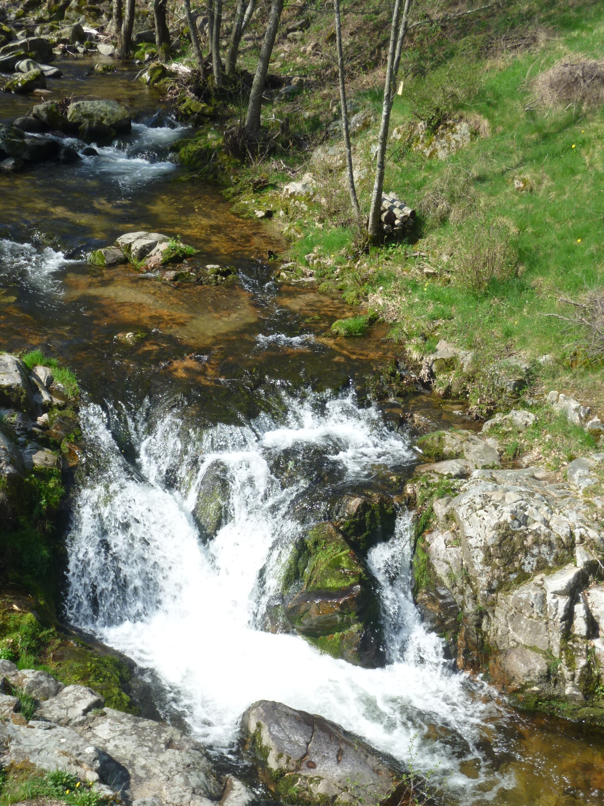 Ruisseau à Saint-Pierreville, Ardèche, France